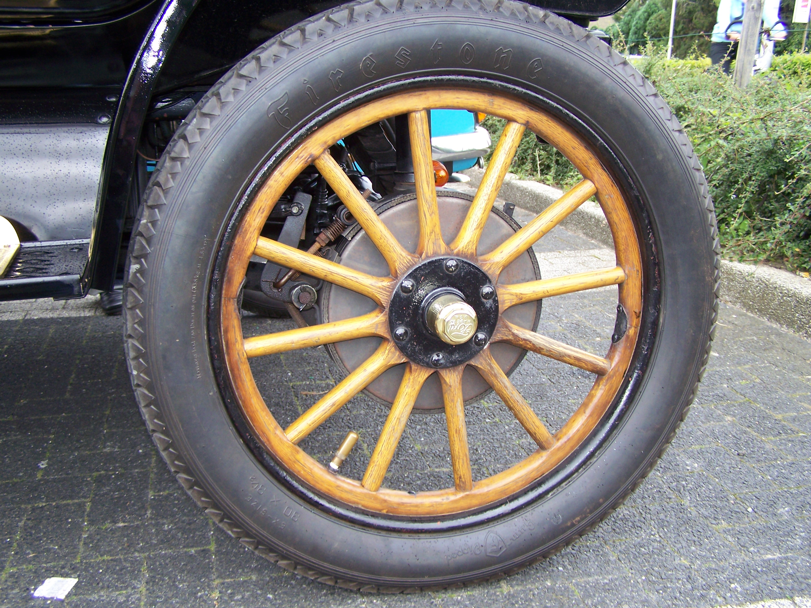 Detail Ford Modell T - 1914, in Herzogenrath